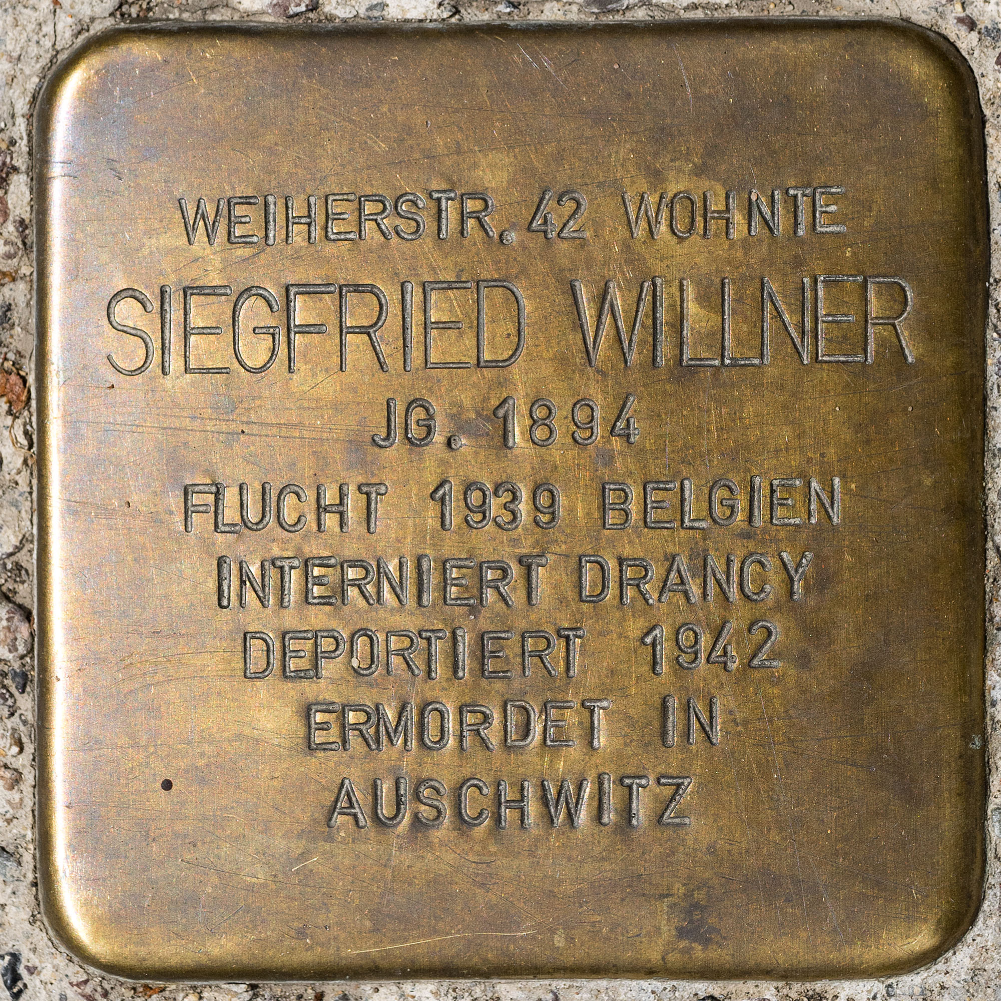 Stolpersteine MG: Willner, Siegfried